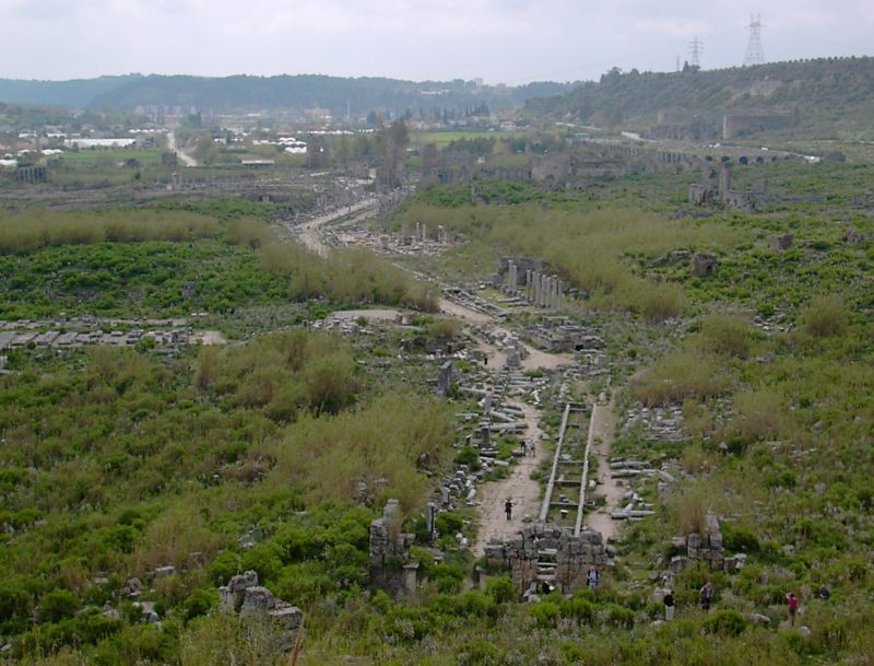 Perge von der Agora